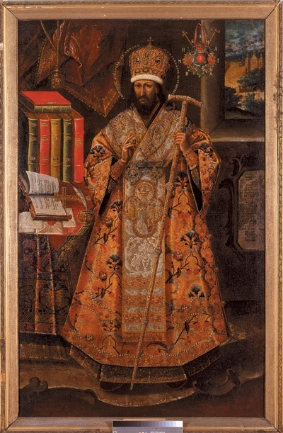 Алимпий Галик. Портрет митрополита Дмитрия Ростовского (Туптала). Масло на доске. 205х105 см. II-aя половина XVIII ст. Национальный художественный музей Украины (НХМУ), Киев.